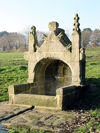 Ergué-Gabéric (Bretagne, Finistère) Kapelle von Kerdevot, Quellbrunnen.